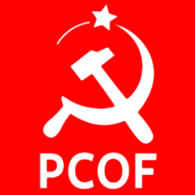 Logo del Partido Comunista Obrero Frances